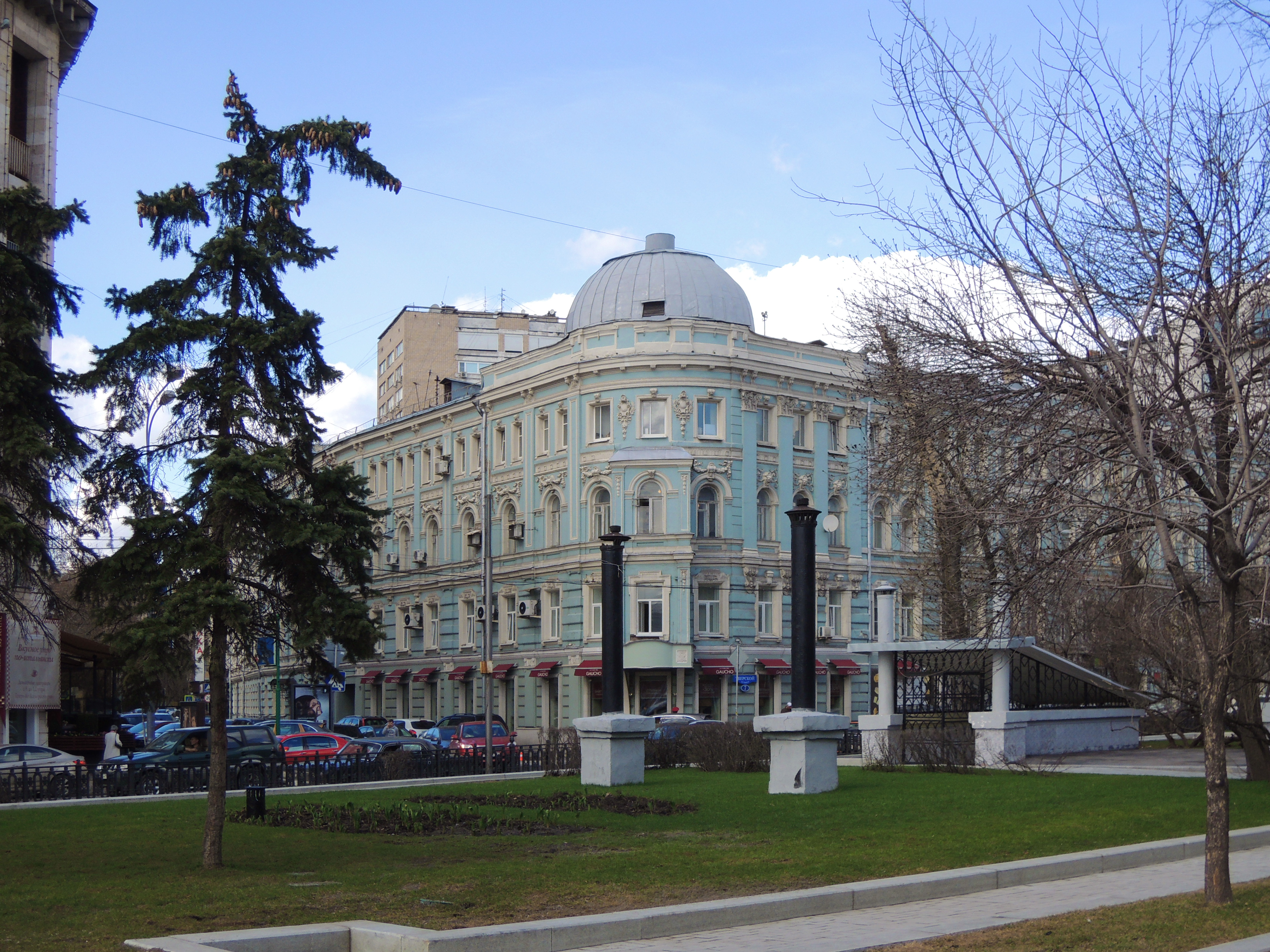 Тверской бульвар. № 7/2 — доходный дом «Общества для пособия нуждающимся студентам Императорского Московского Университета» (1882, архитекторы В. П. Загорский, Н. Д. Струков, И. И. Поздеев), объект культурного наследия регионального значения[2]. В доме жил поэт Василий Наседкин, у которого часто бывал Сергей Есенин